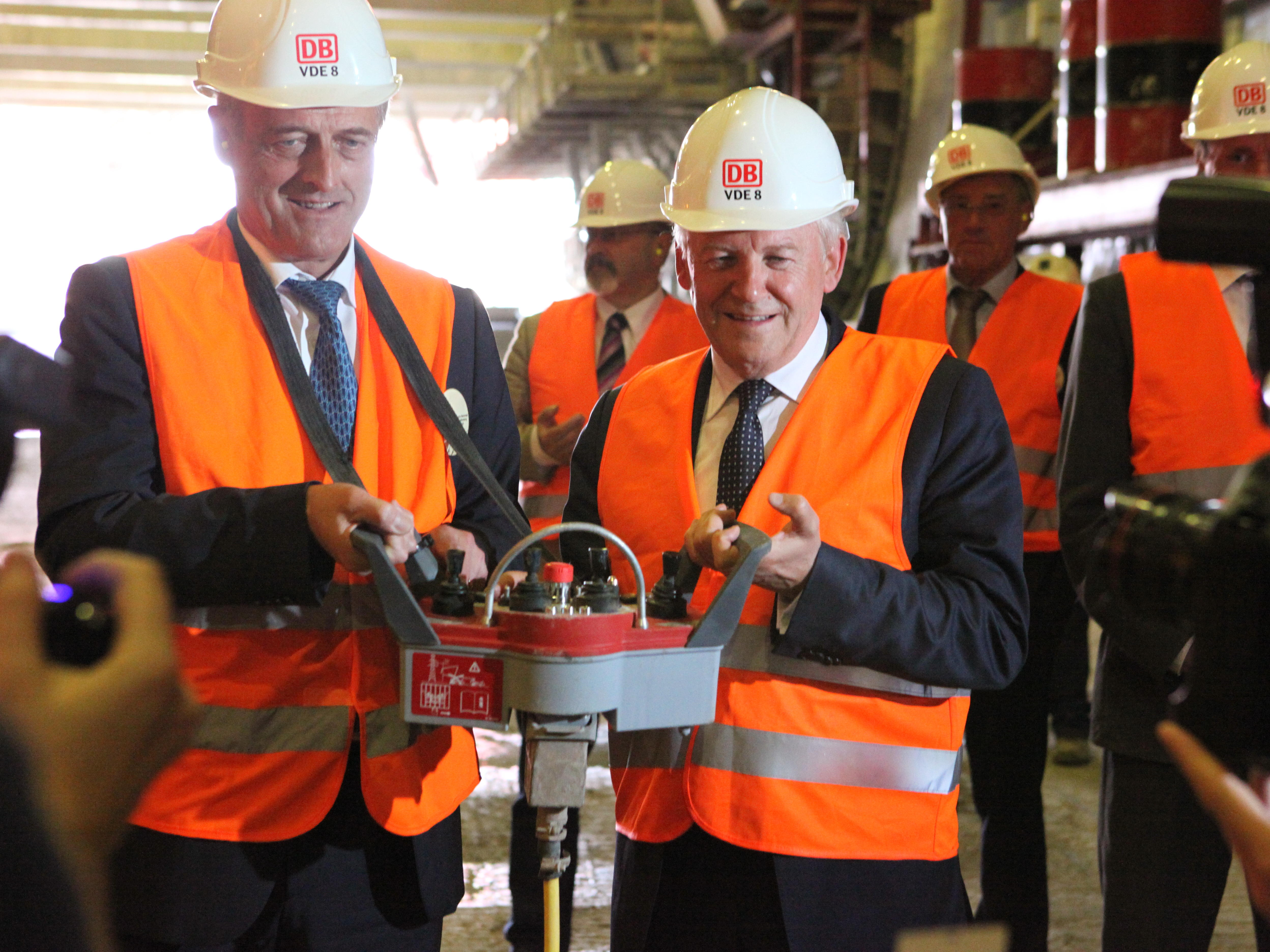 Ramsauer und Grube am 6. Mai 2013 bei der letzten Tunnelbetonage des Tunnels Höhnberg